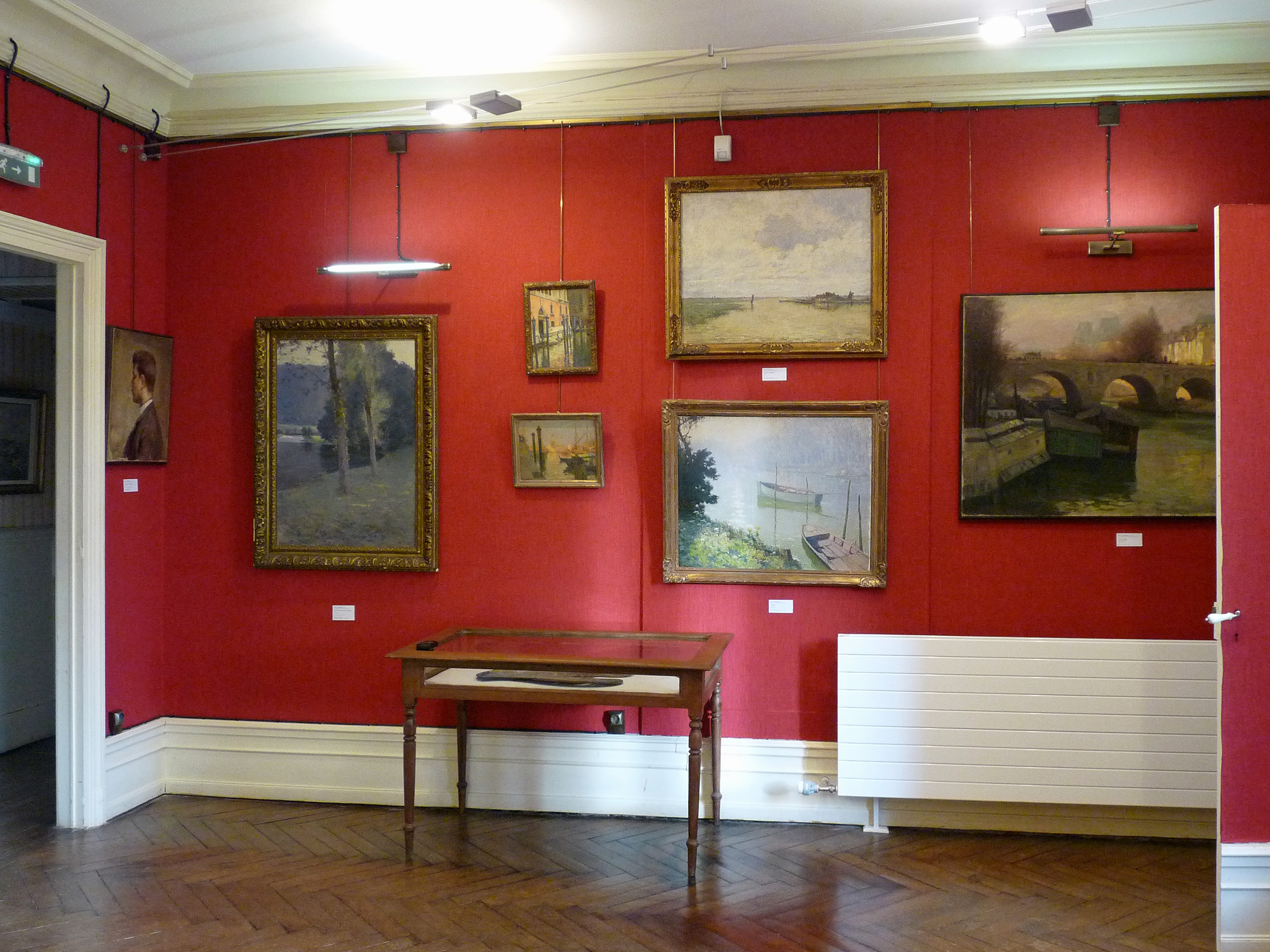 Pierre Waidmann (1860-1937) : Présentation d'oeuvres au Musée Charles Friry (Remiremont, Vosges)